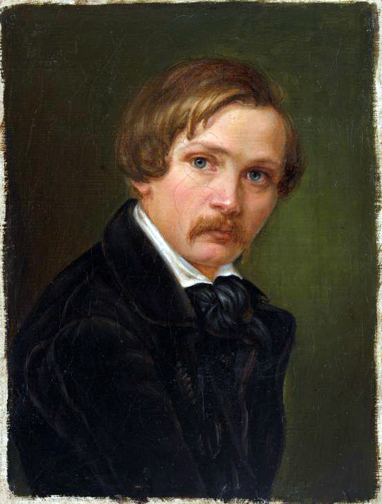 Eugene von Guerard, Austrian painter (1811–1901)